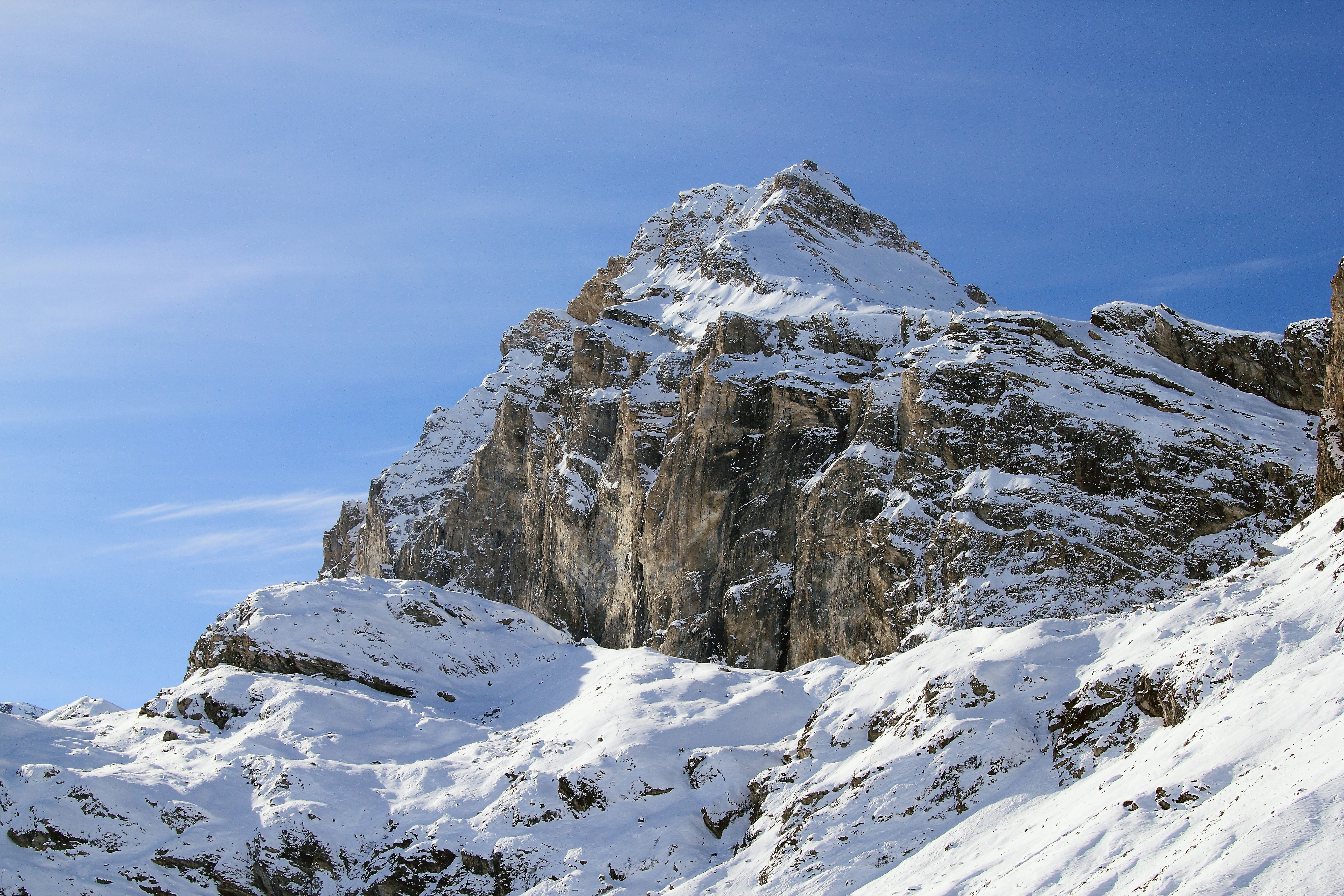 Granta Parei - Val di Rhêmes